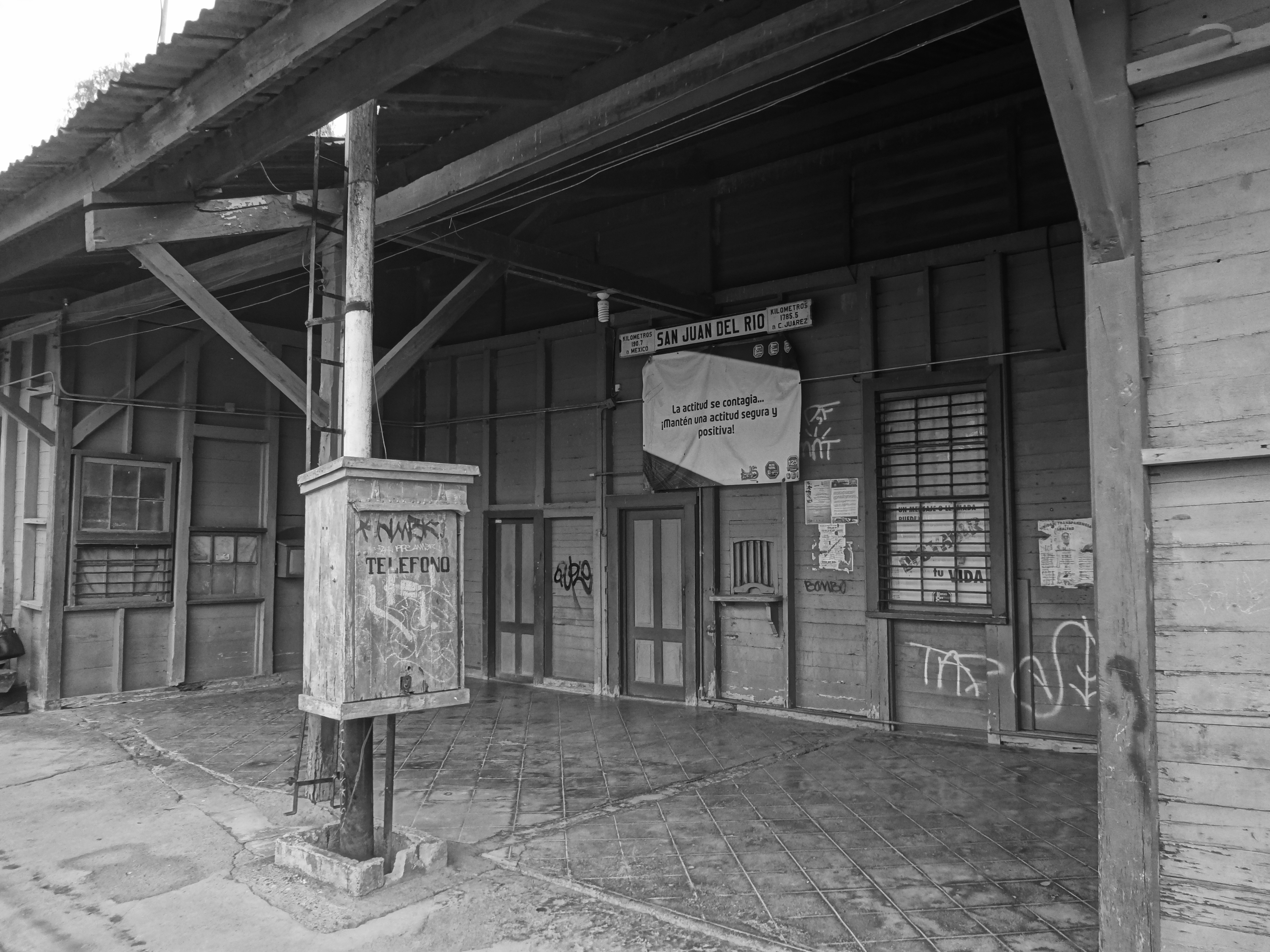 Fotografía: Taquilla antigua Estación San Juan del Río, San Juan del Río, Qro. MEX